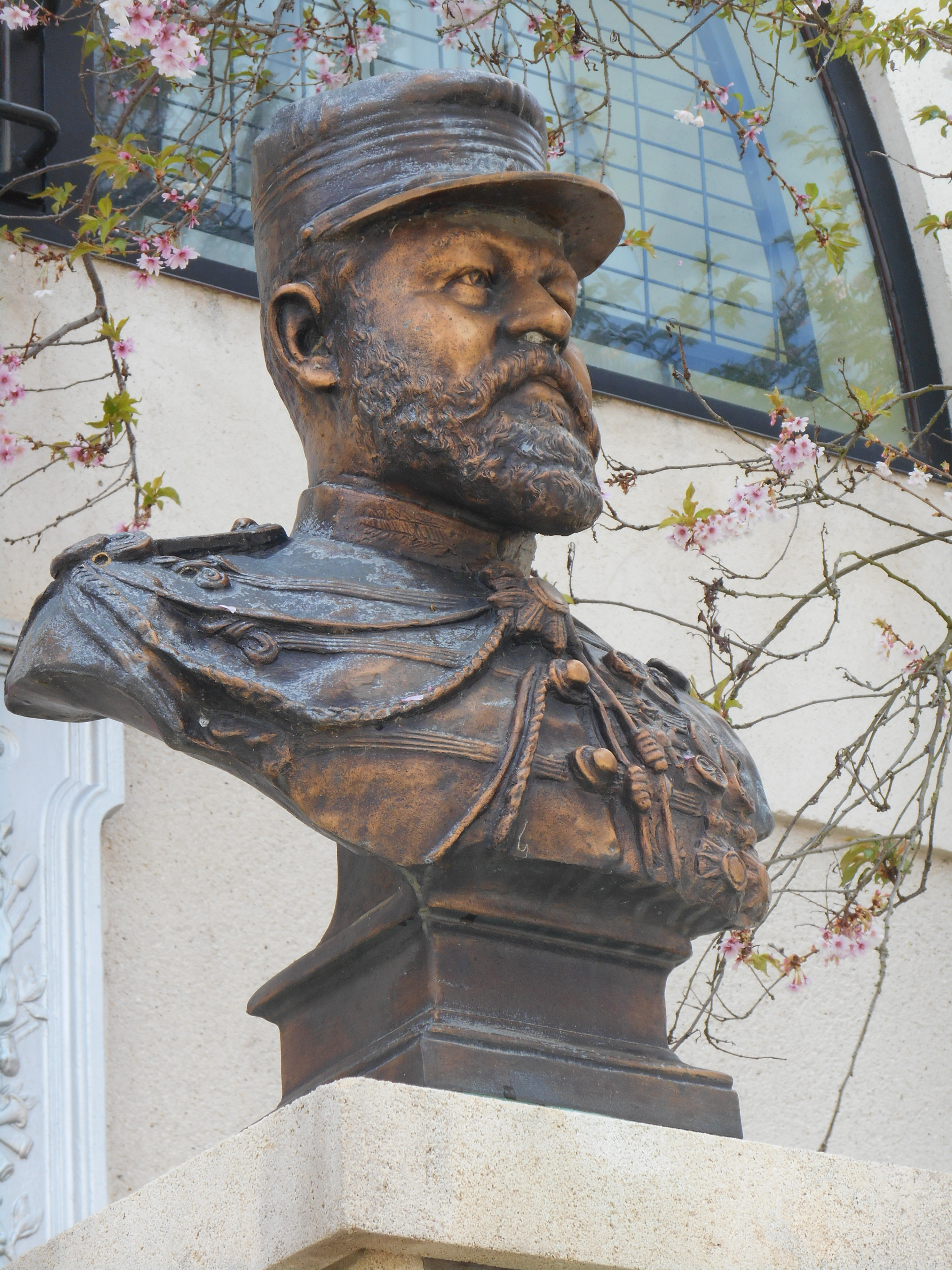 Buste du commandant Berthault, à Esbly (77)